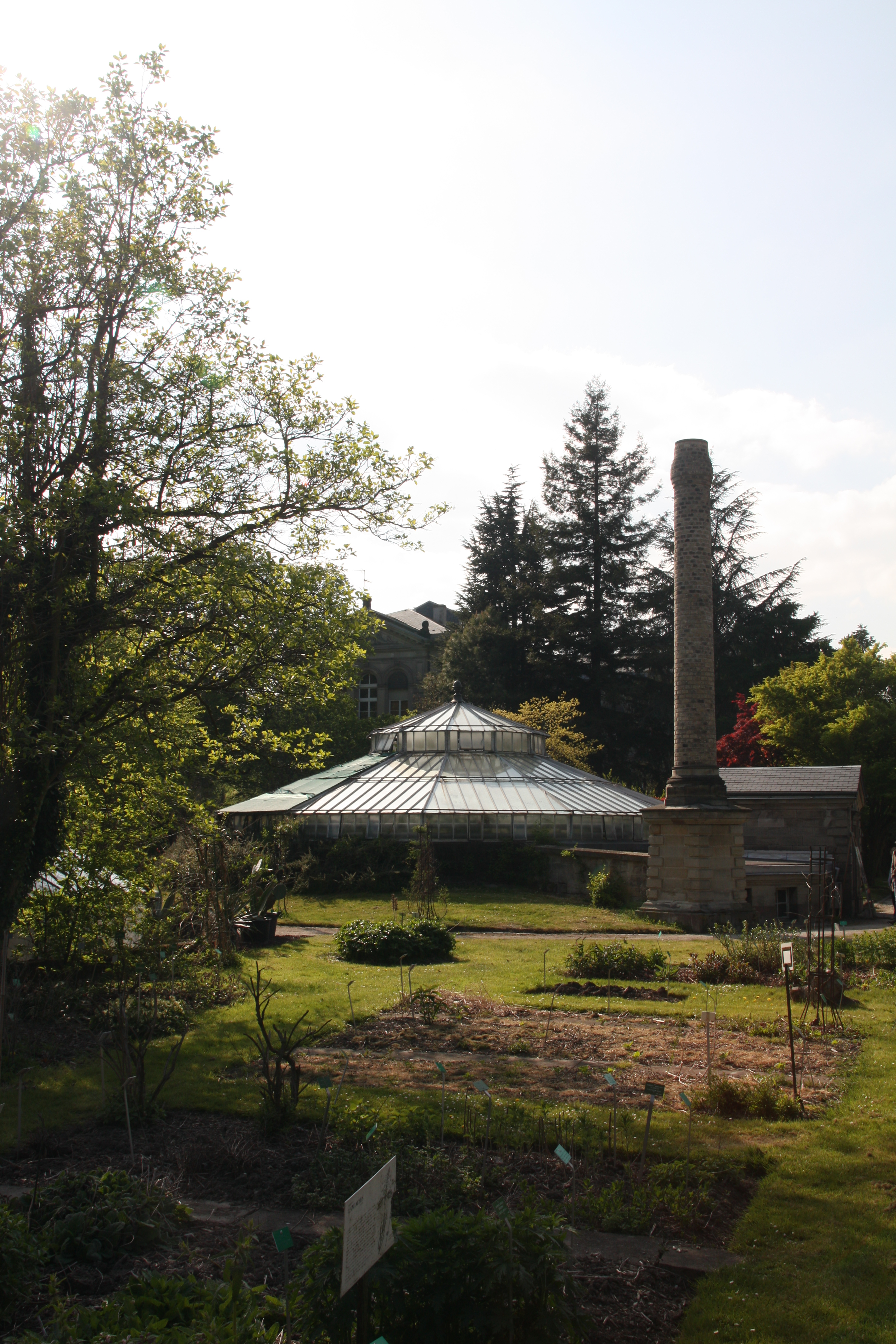 La serre de Bary dans le Jardin botanique de l'université de Strasbourg, Alsace, France.